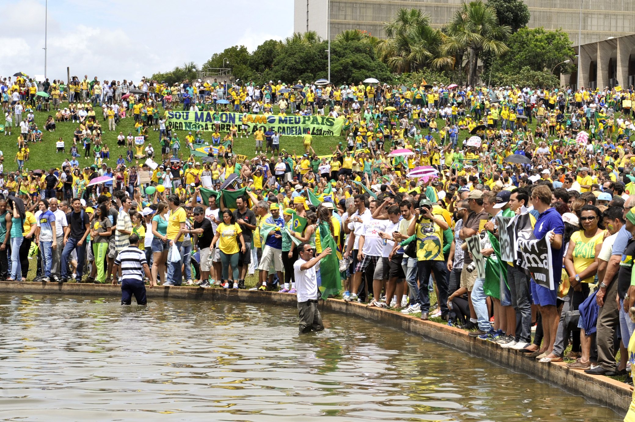 Manifestantes tomam gramado em frente ao Congresso Nacional e protestam pelo fim da corrupção no Brasil. Vestidos com camisetas verdes e amarelas, milhares de manifestantes lotaram de forma pacífica neste domingo (15) a Esplanada dos Ministérios, em Brasília, para protestar contra a presidente Dilma Rousseff e pedir o fim da corrupção no país. Segundo o Departamento Operacional da Polícia Militar do Distrito Federal, ao menos 45 mil pessoas atenderam às convocações feitas nas redes sociais para o protesto contra o governo. Um dos organizadores do movimento Vem Pra Rua, calculou em pelo menos 80 mil o número de pessoas que participaram da manifestação na capital federal. Foto: Jonas Pereira/Agência Senado